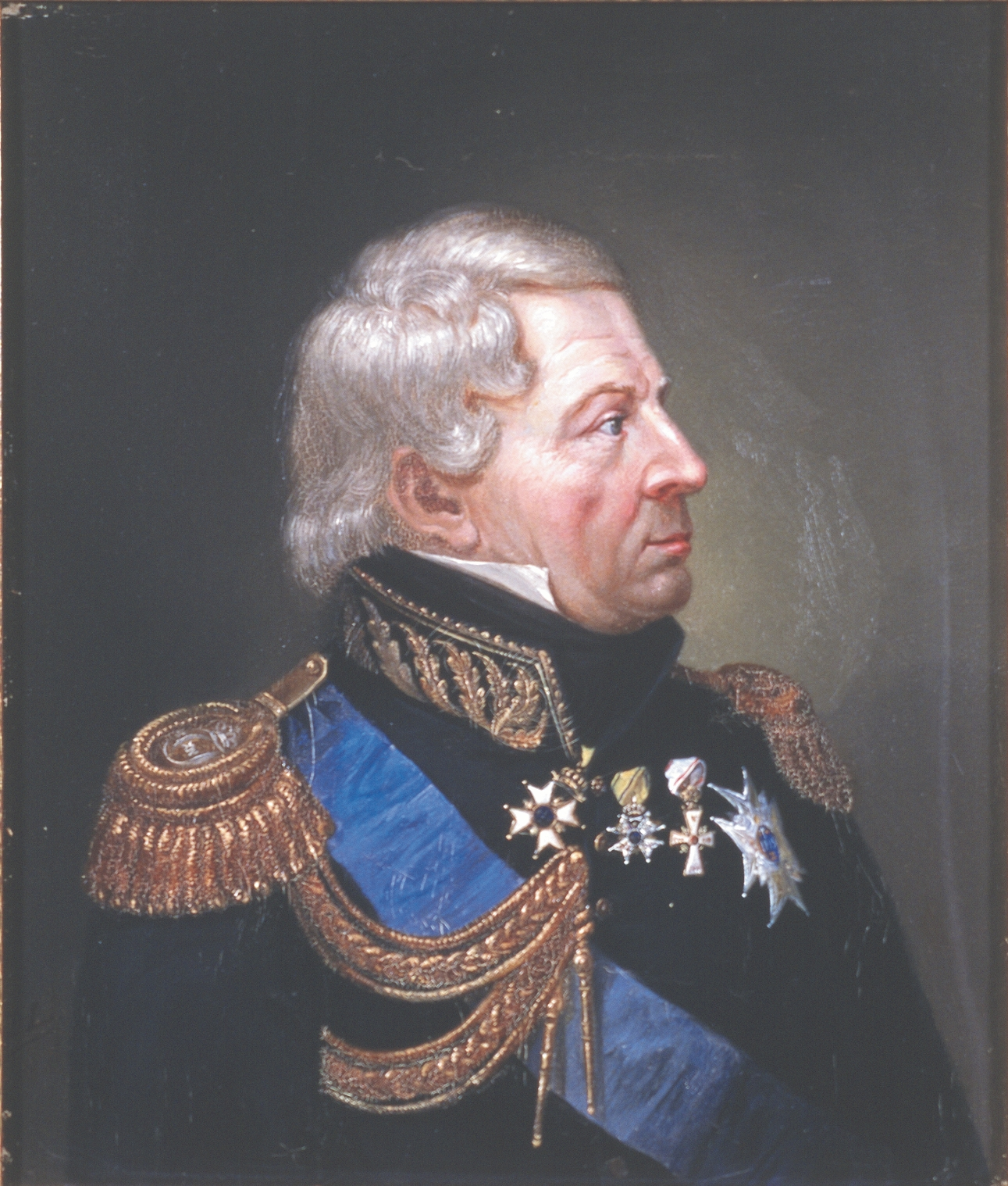 Det blå båndet er serafimerordenens ordensbånd og ordenene er Kommandørkorset av Sverdordenen om halsen, og Sverdordenen, Dannebrogsordenen og Serafimerordenen på brystet.